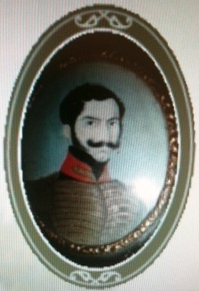 Brigadier (General de Brigada) de Caballería de los Ejércitos Nacionales, Caballero de las Reales Órdenes de San Fernando y San Hermenegildo. Comandante General de la provincia de Cáceres y Gobernado de la de Alcántara.